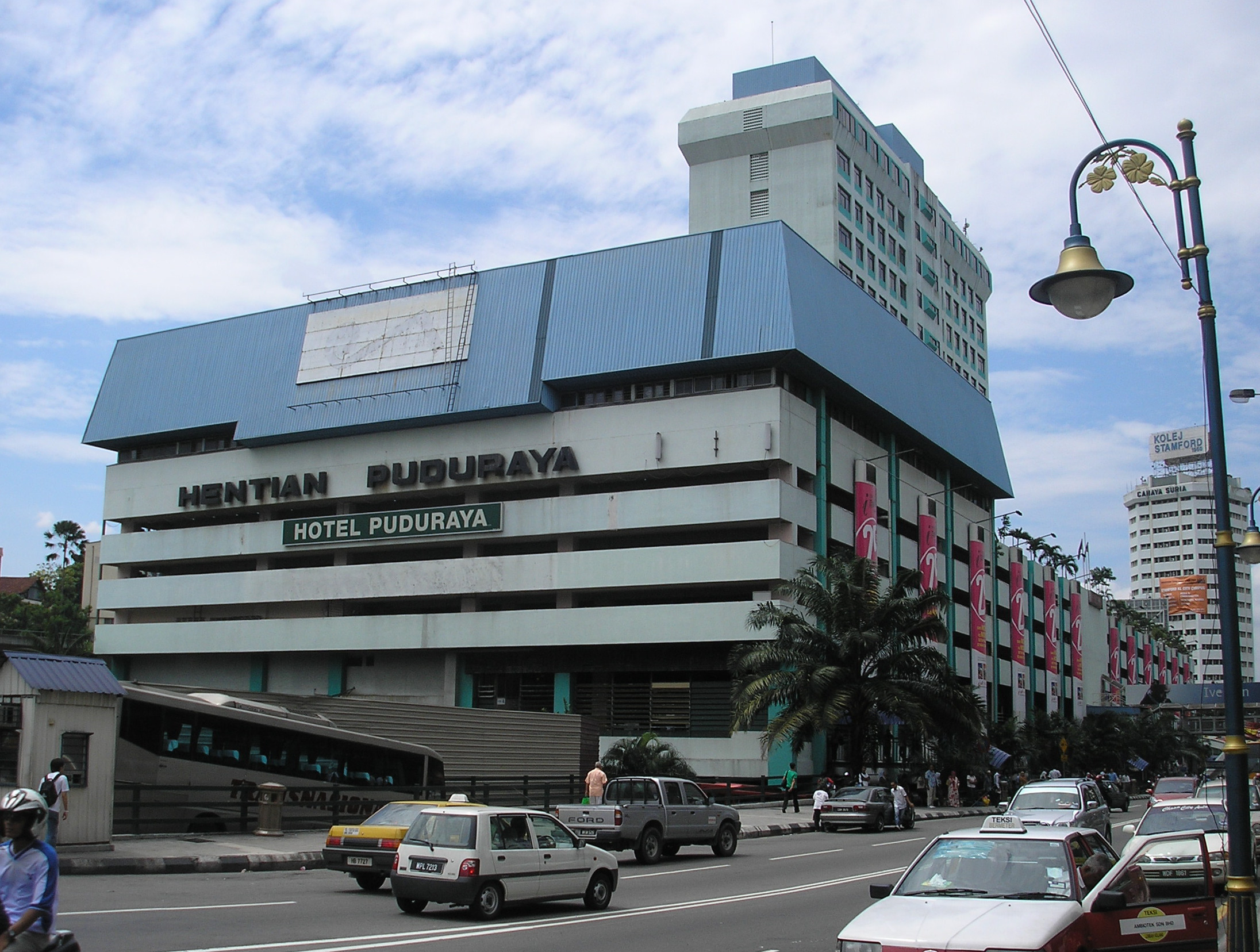 Puduraya in the afternoon, Kuala Lumpur, Malaysia.